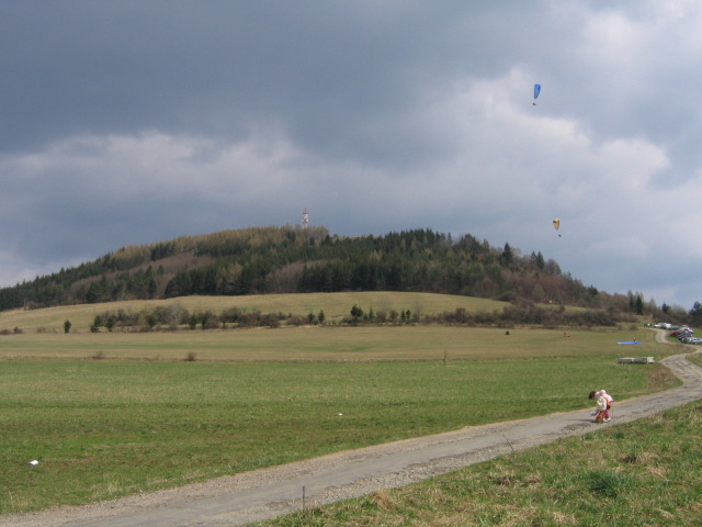 Straník near Žilina